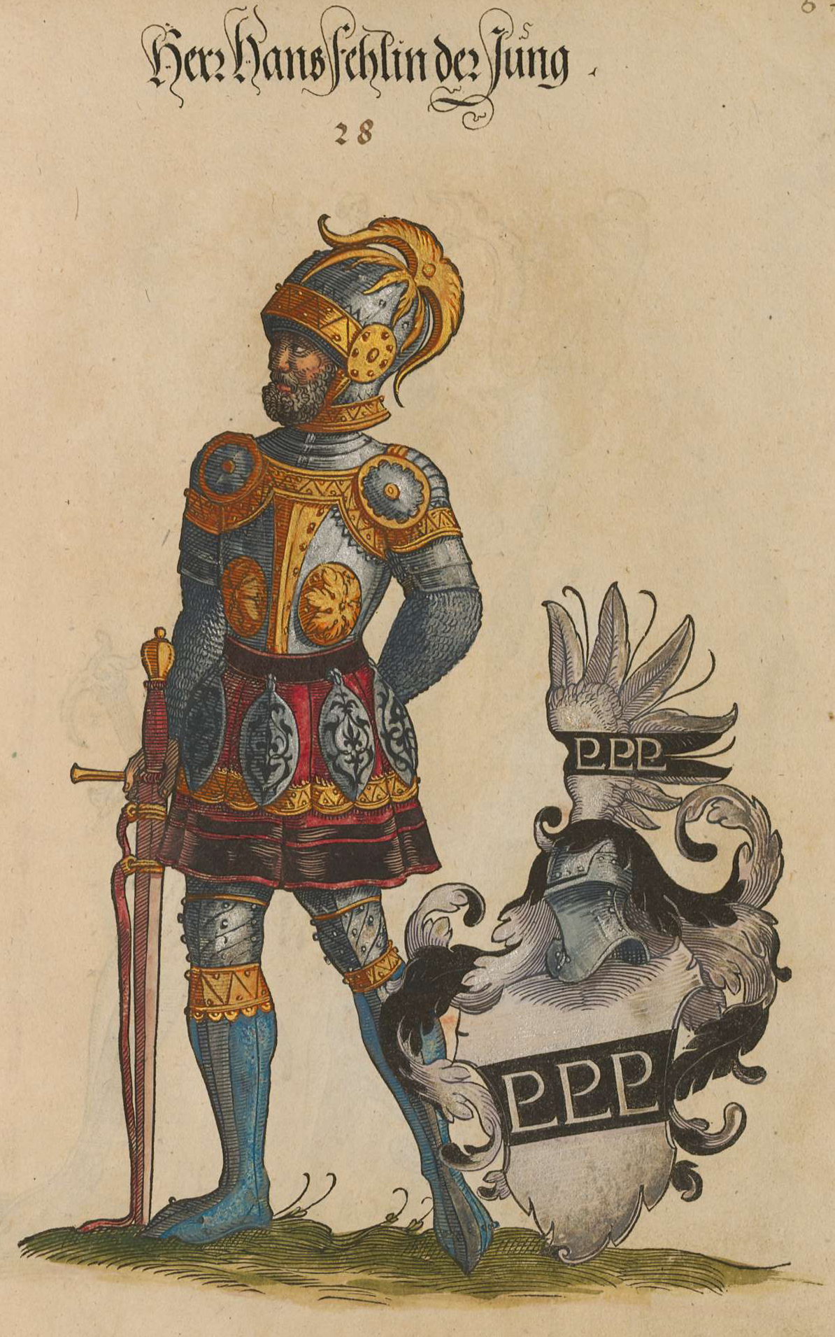 Wappen der Vöhlin, Cod.icon. 312 b, Geschlechterbuch der Stadt Augsburg, Seite 67r